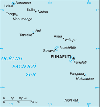 Mapa de Tuvalu.